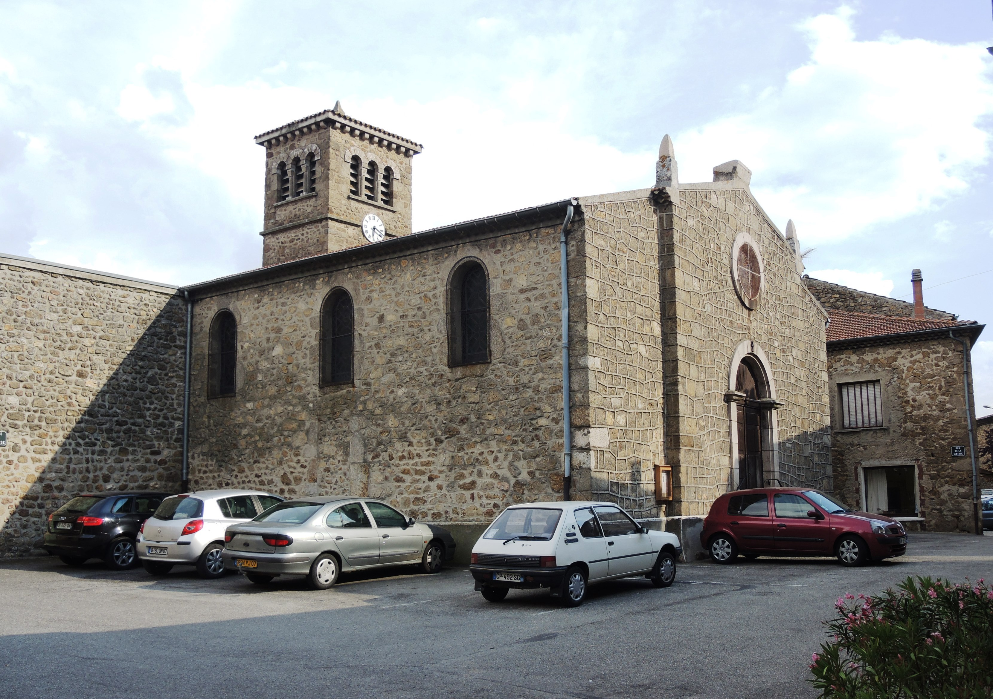 St-Jeure d'Ay église extérieur